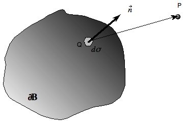 Graphique produit par moi-même pour utiliser l'article Géodésie physique. Je le mets dans le domaine public. Carlo Denis